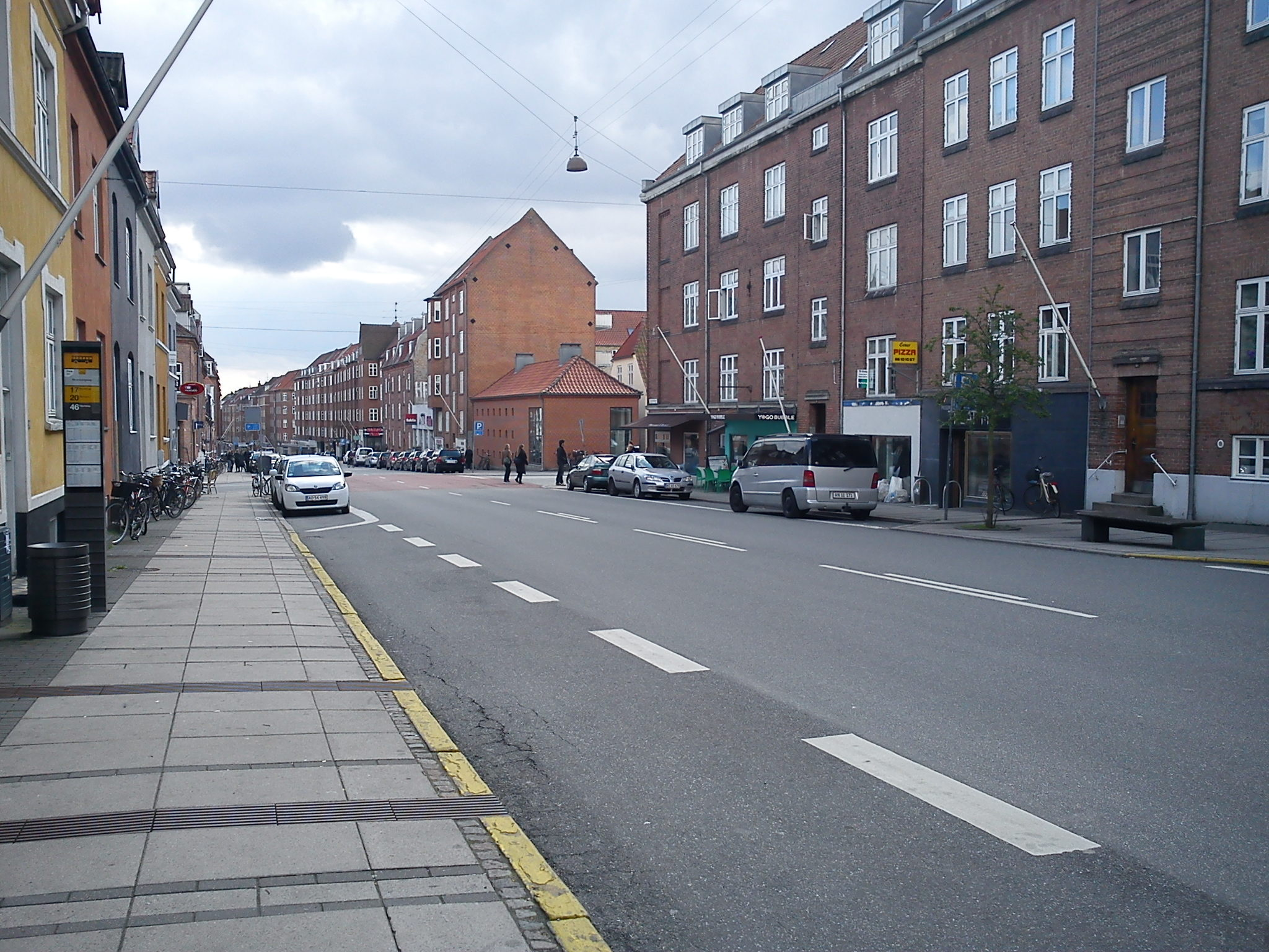 Tordenskjoldsgade på Trøjborg, Aarhus.